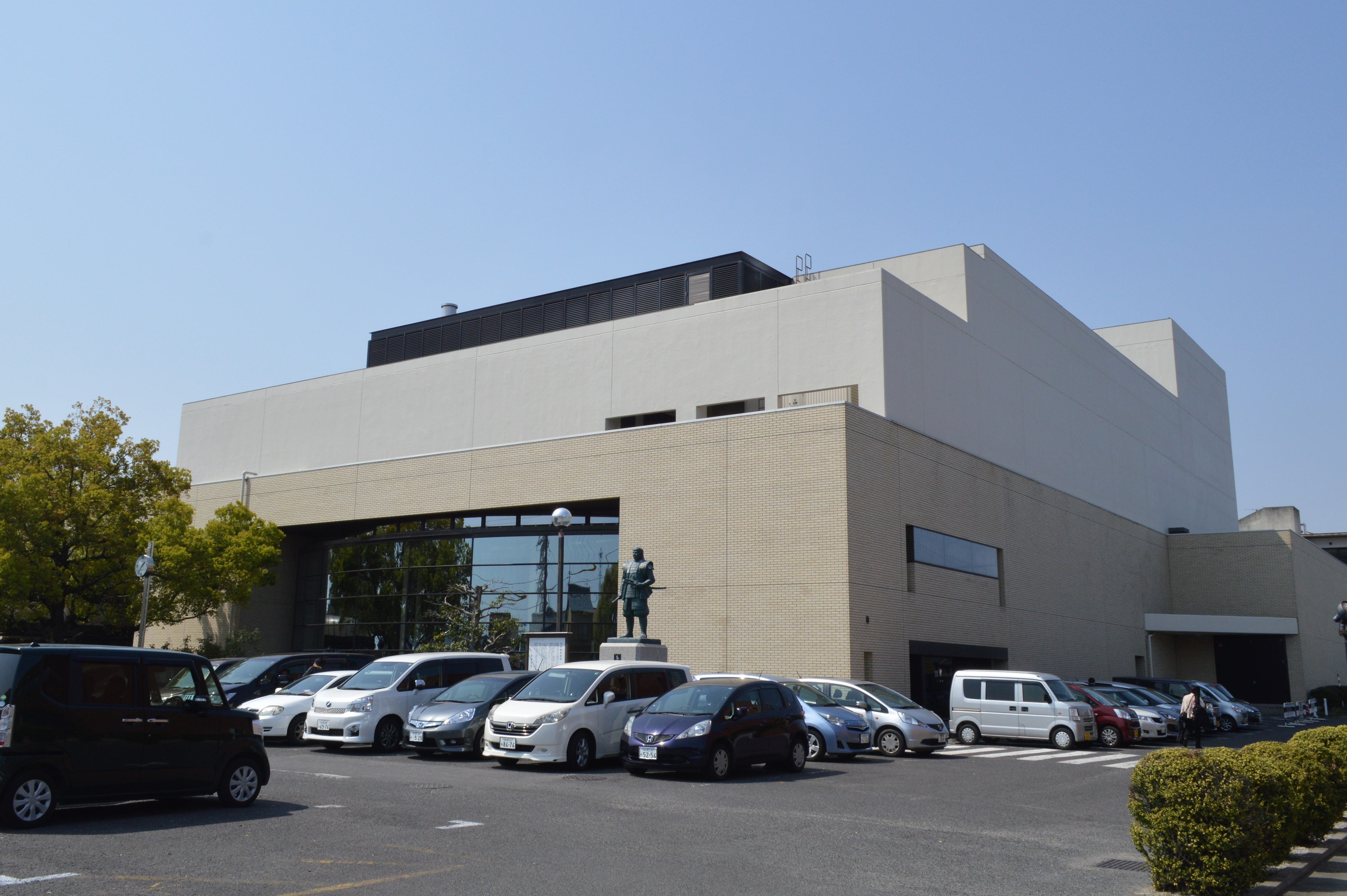 愛知県尾張旭市の尾張旭市文化会館。1981年開館。